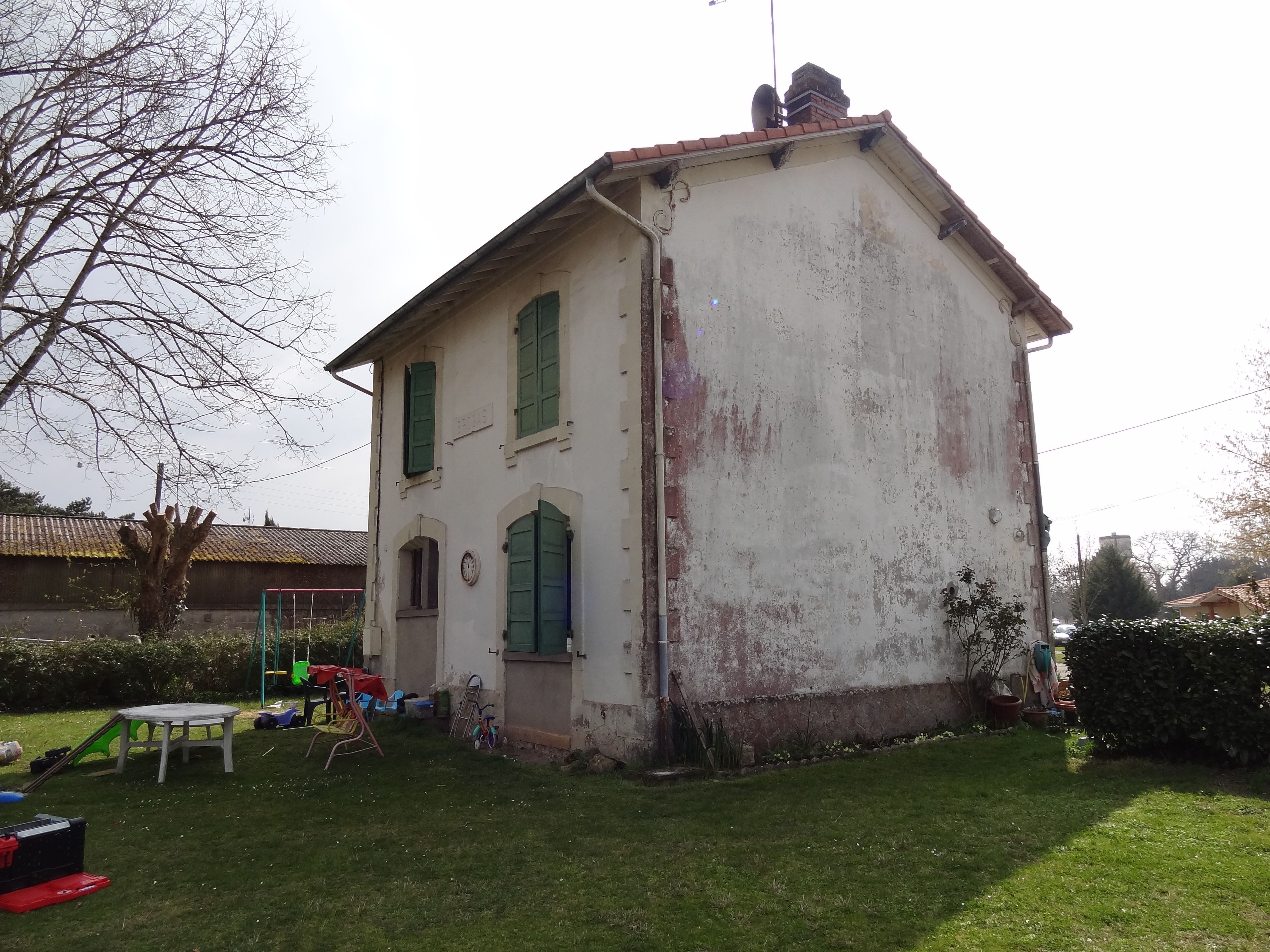 Ancienne gare de Brocas